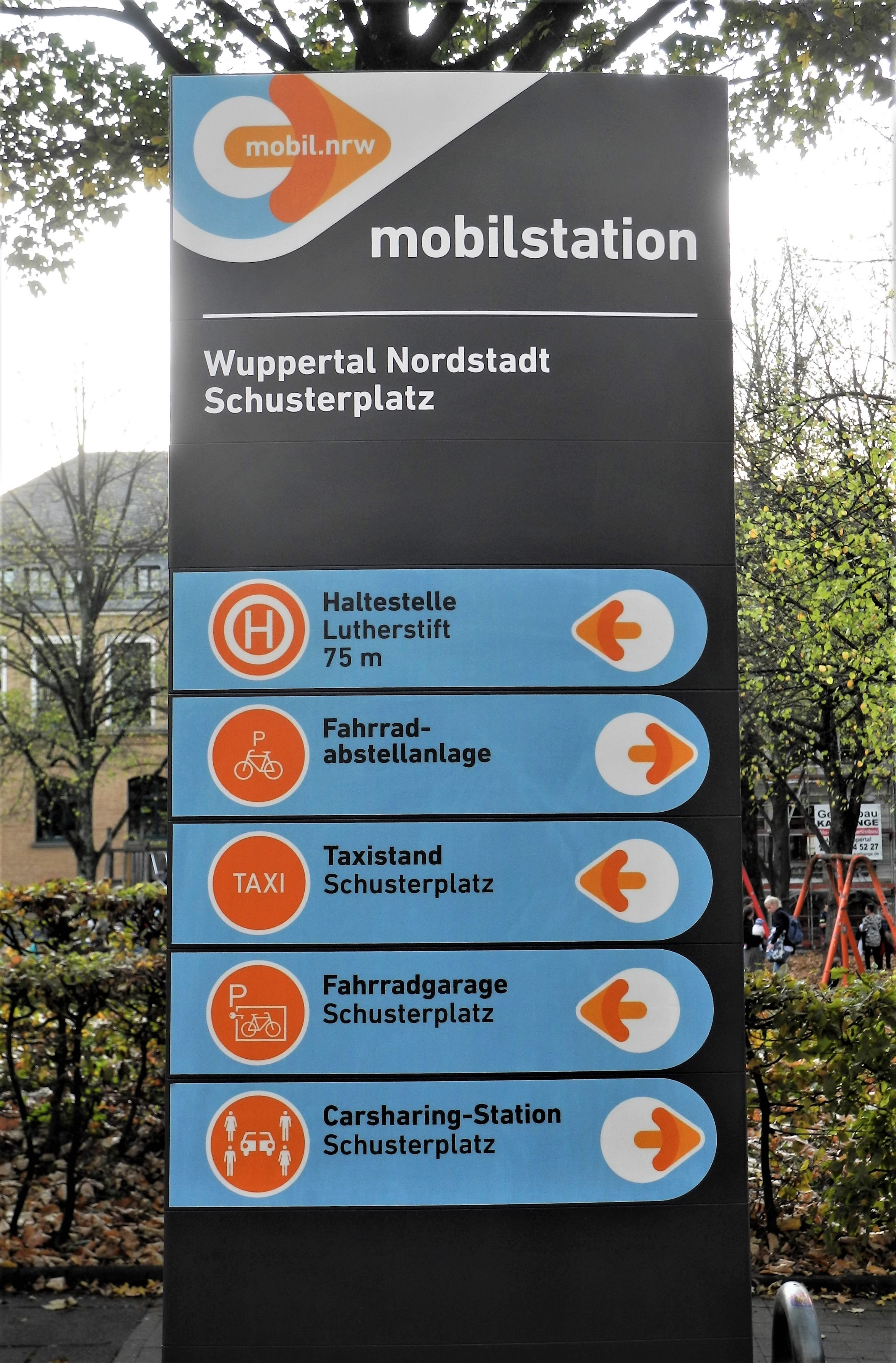 Wuppertal, Wohnquartier Nordstadt, Schneiderstraße, Mobilstation Schusterplatz, Info-Tafel